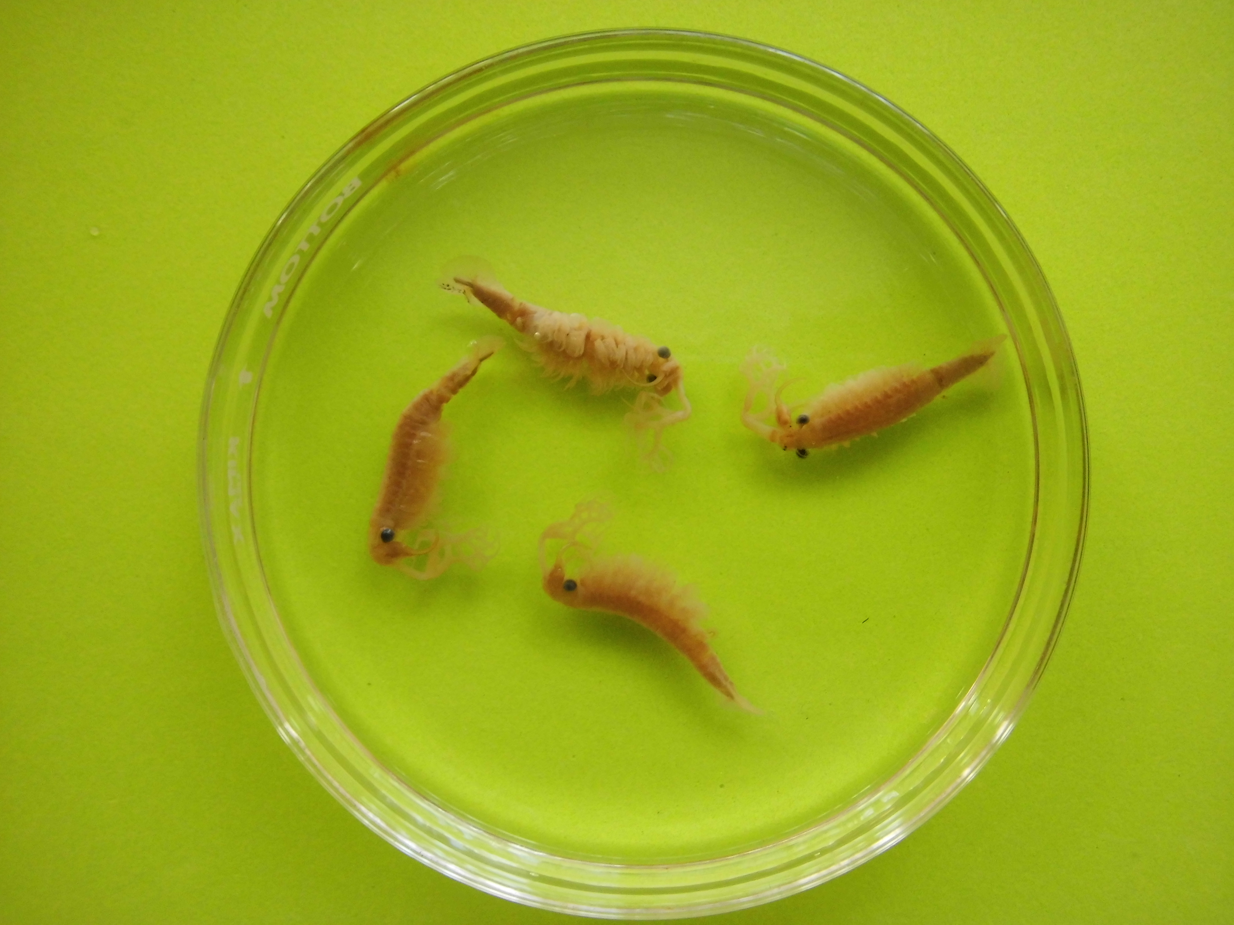 Thamnocephalus venezuelensis Belk & Pereira, 1982